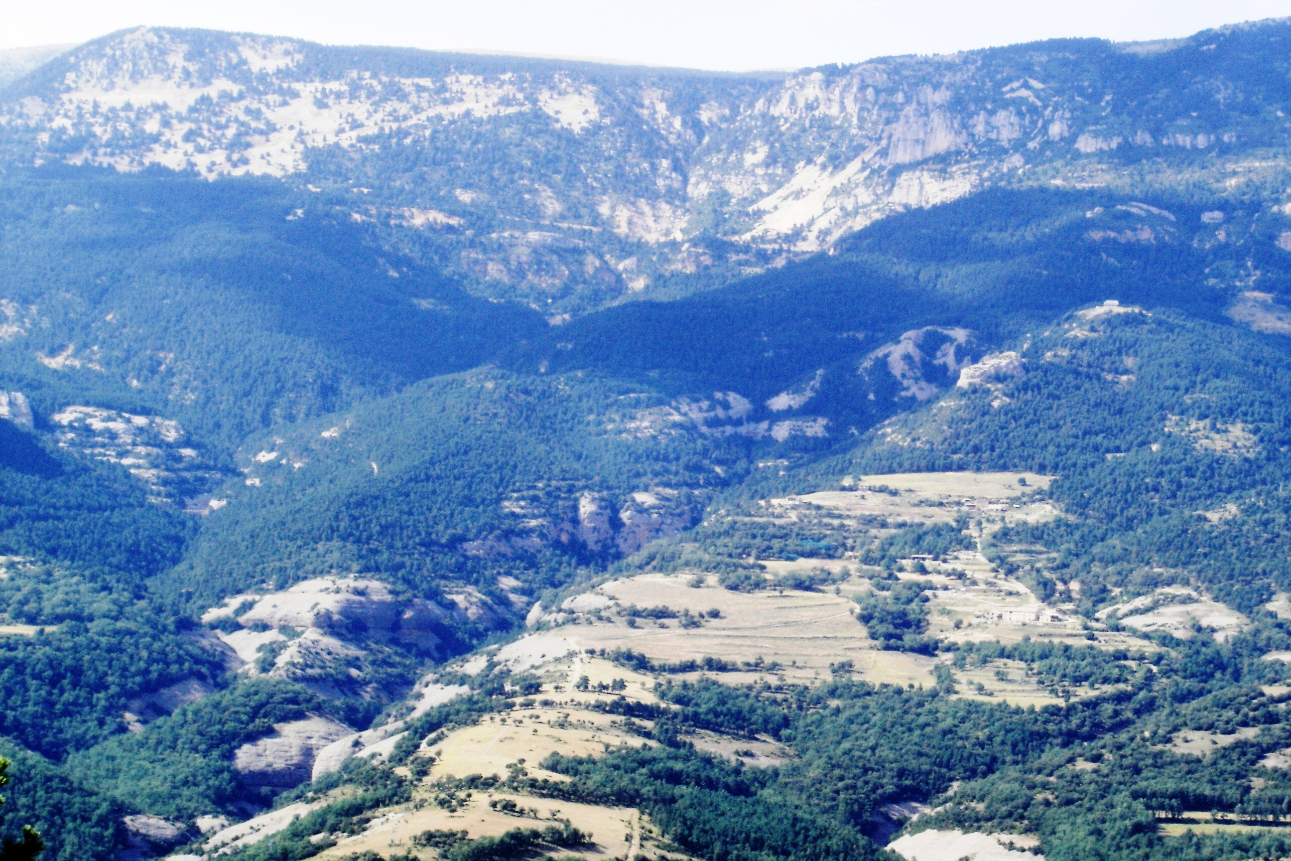 A la banda dreta, atravessant la fotografia en diagonal des de la part superior esquerra, el torrent d'Urdoll. A la dreta de la seva capçalera, aturonat, el Refugi de l'Urdoll. A la banda esquerra, la riera de Canalda. Al fons, la vessant meridional de la part oriental de la Serra de Querol partida per la riera de Canalda que baixa del Prat de Bassies quedant a la banda dreta la Garriga Gran i a la banda esquerra la Costa dels Prats. Sota d'amdues s'hi endevina el camí que puja cap el Prat de Bassies. Al quadrant inferior dret de la imatge en la carena sense boscos, a la part inferior, vora de la Rasa de Puig-arnau, la masia de Puig-arnau. Damunt seu, també vora de la mateixa rasa, la masia de Cal Pubilló i a la seva esquerra, vora la canal del torrent d'Urdoll, la casa de turisme rural Pubilló 2.